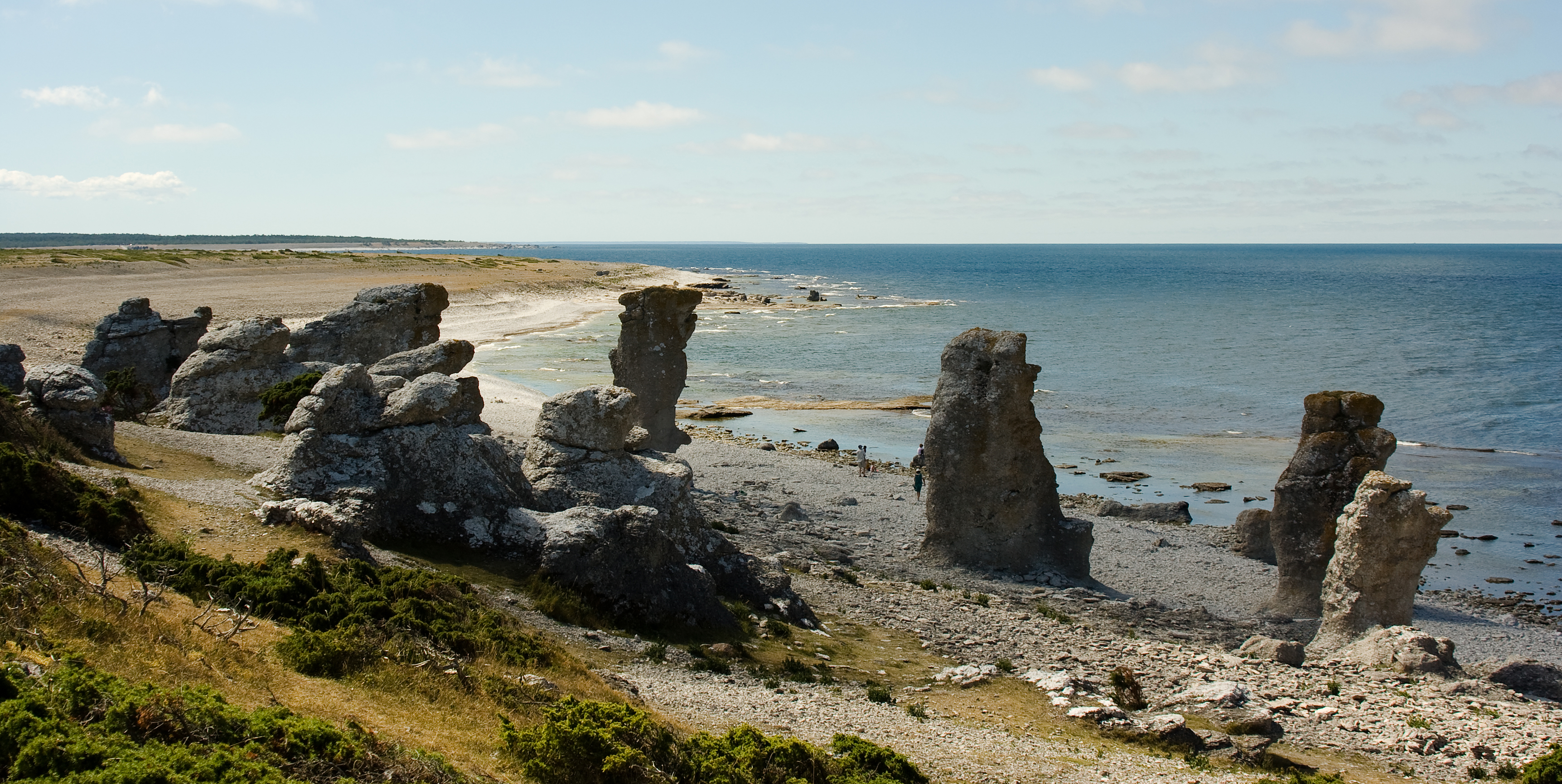 Raukgebiet Langhammars, Farö, Schweden